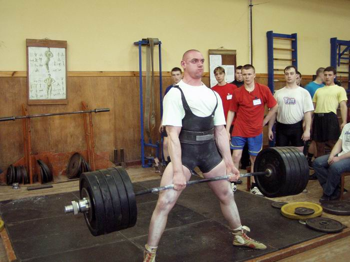 Волотовский Юрий на соревнованиях